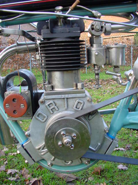 Michl Orion 1905 onbekend.